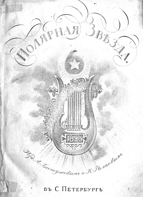 Гравированный титульный лист литературного альманаха "Полярная звезда" на 1823 год, издававшегося декабристами Кондратием Рылеевым и Александром Бестужевым-Марлинским.